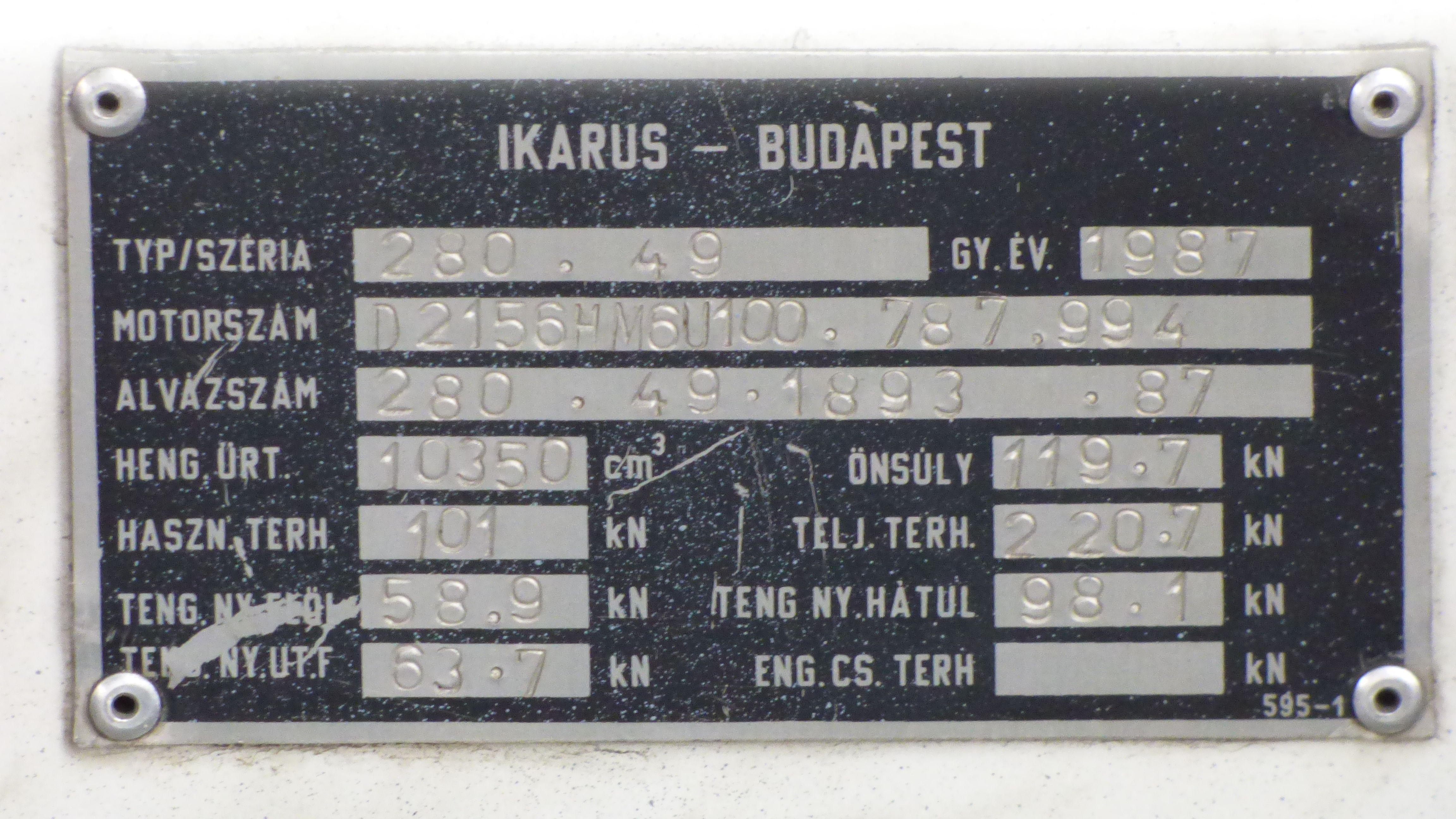 A BPO-460-as Ikarus 280.49-es busz gyári táblája